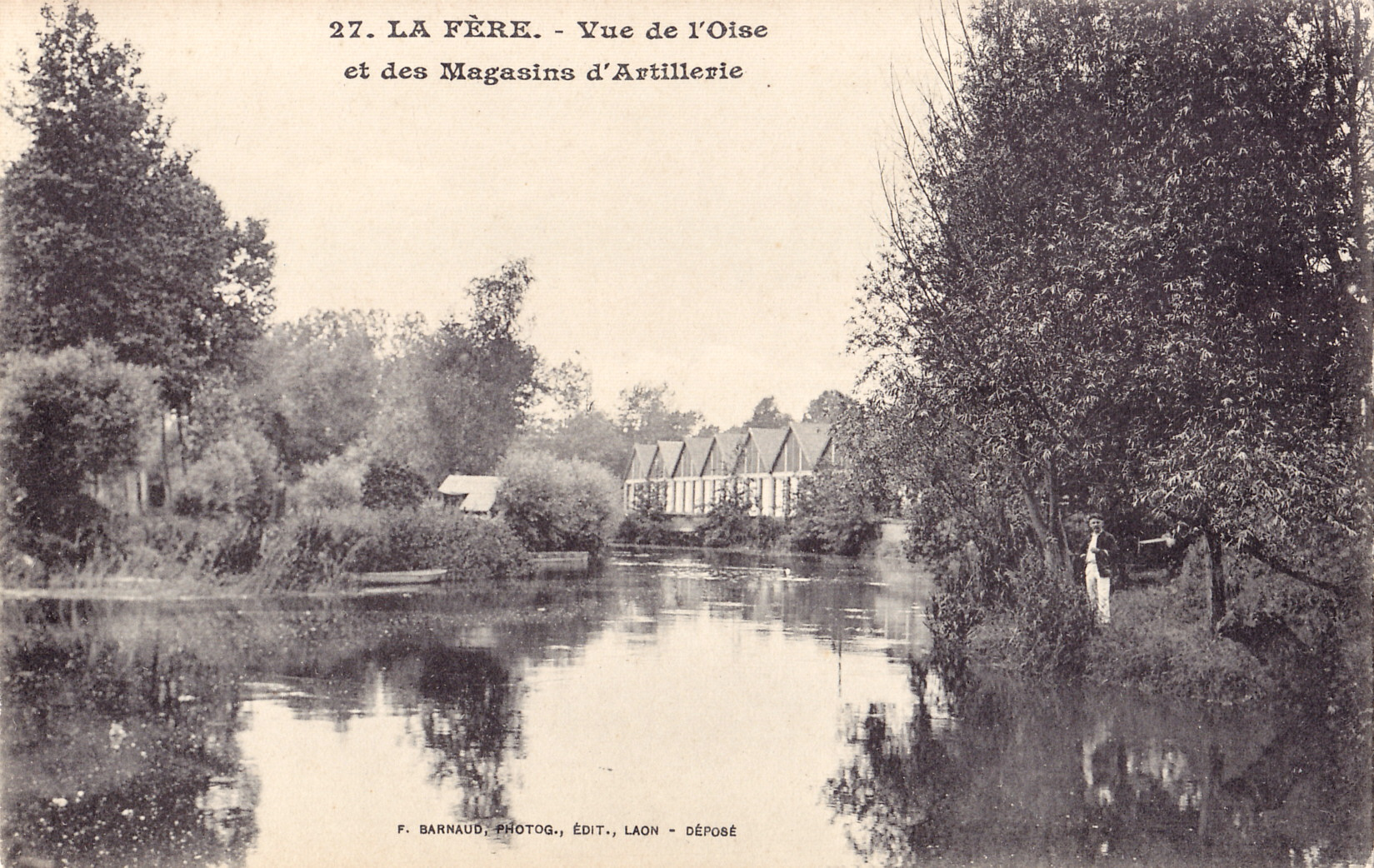 Carte postale ancienne éditée par F. Barnaud à Laon, n°27 : LA FERE - Vue de l'Oise et des Magasins d'Artillerie